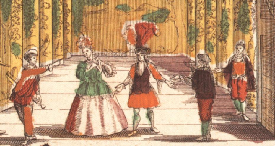 Fecht- oder Tagkomödienhaus zu Nürnberg während einer Theazeraufführung, Ausschnitt von koloriertem Kupferstich